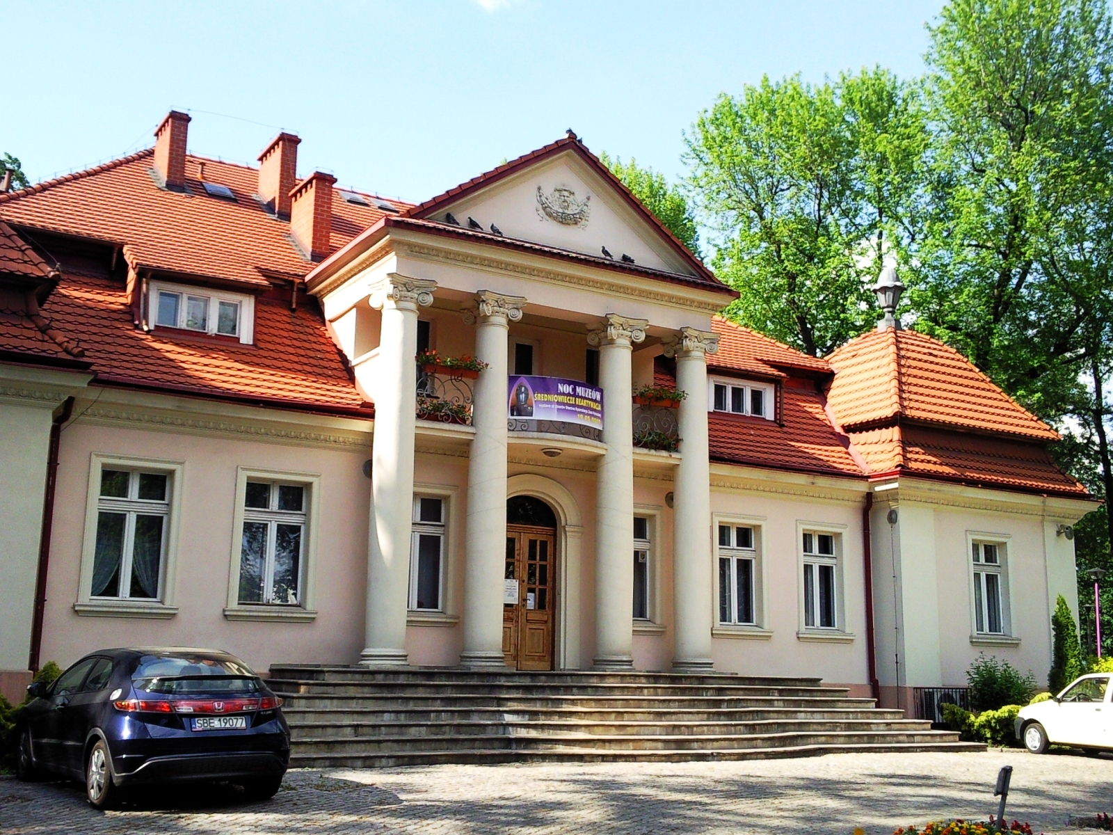 Pałac Pod Filarami - to dawna, przedwojenna willa naczelnego dyrektora kopalni „Saturn”. Od 1 marca 2010 zaczęło tam funkcjonować Muzeum Saturn przekształcone z dotychczas działającej Czeladzkiej Izby Tradycji. Pałac znajduje się w zabytkowej dzielnicy. NIedaleko budynku mieści się: Pałac Saturna - były gmach Towarzystwa Górniczo-Przemysłowego „Saturn”, budynek straży ogniowej, osiedle robotnicze i domy urzędnicze kopalni „Saturn”.